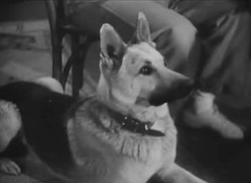 Ace The Wonder Dog dans The Phantom, chapitre 1, 1943.